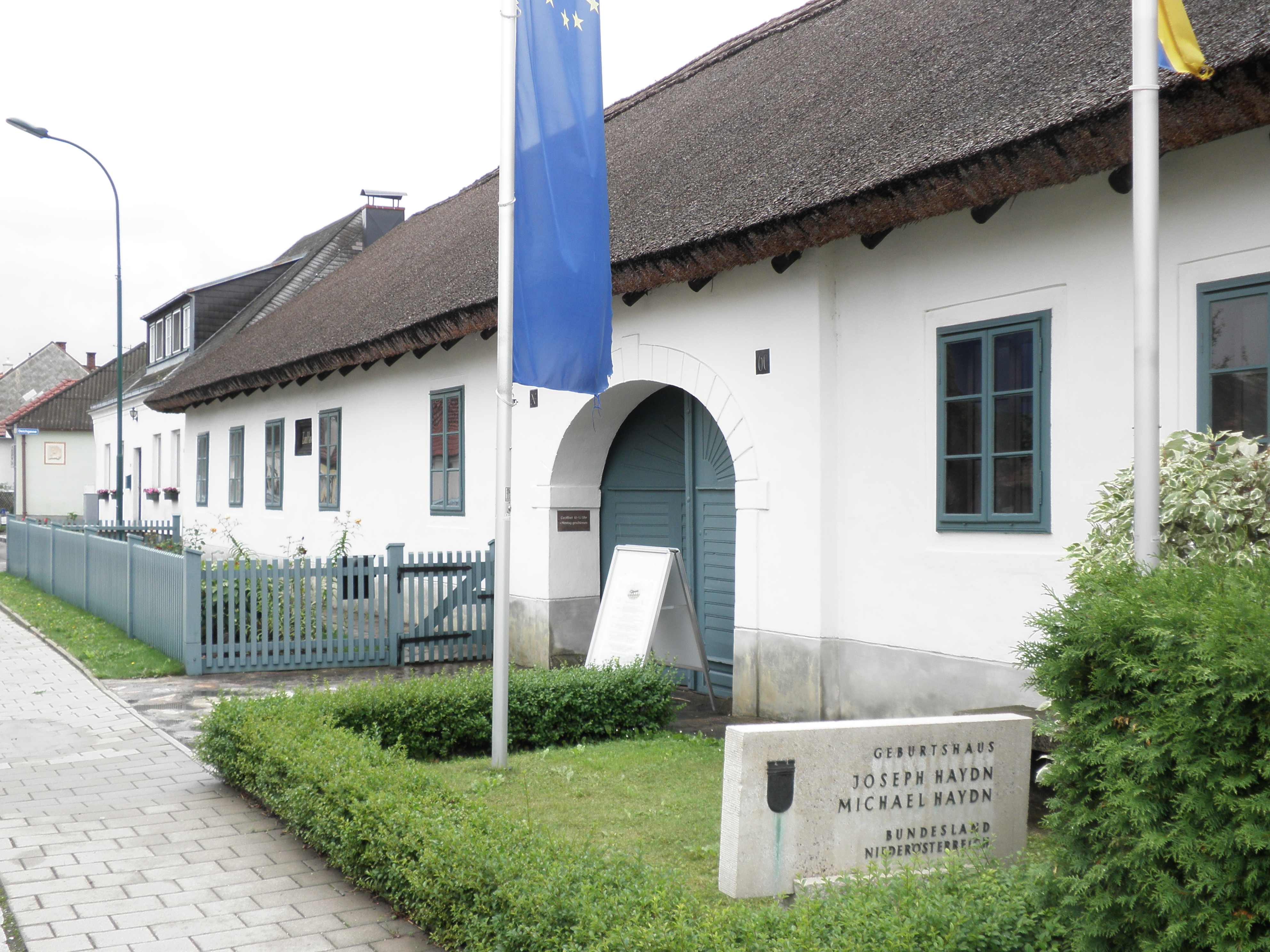 Geburtshaus von Joseph Haydn